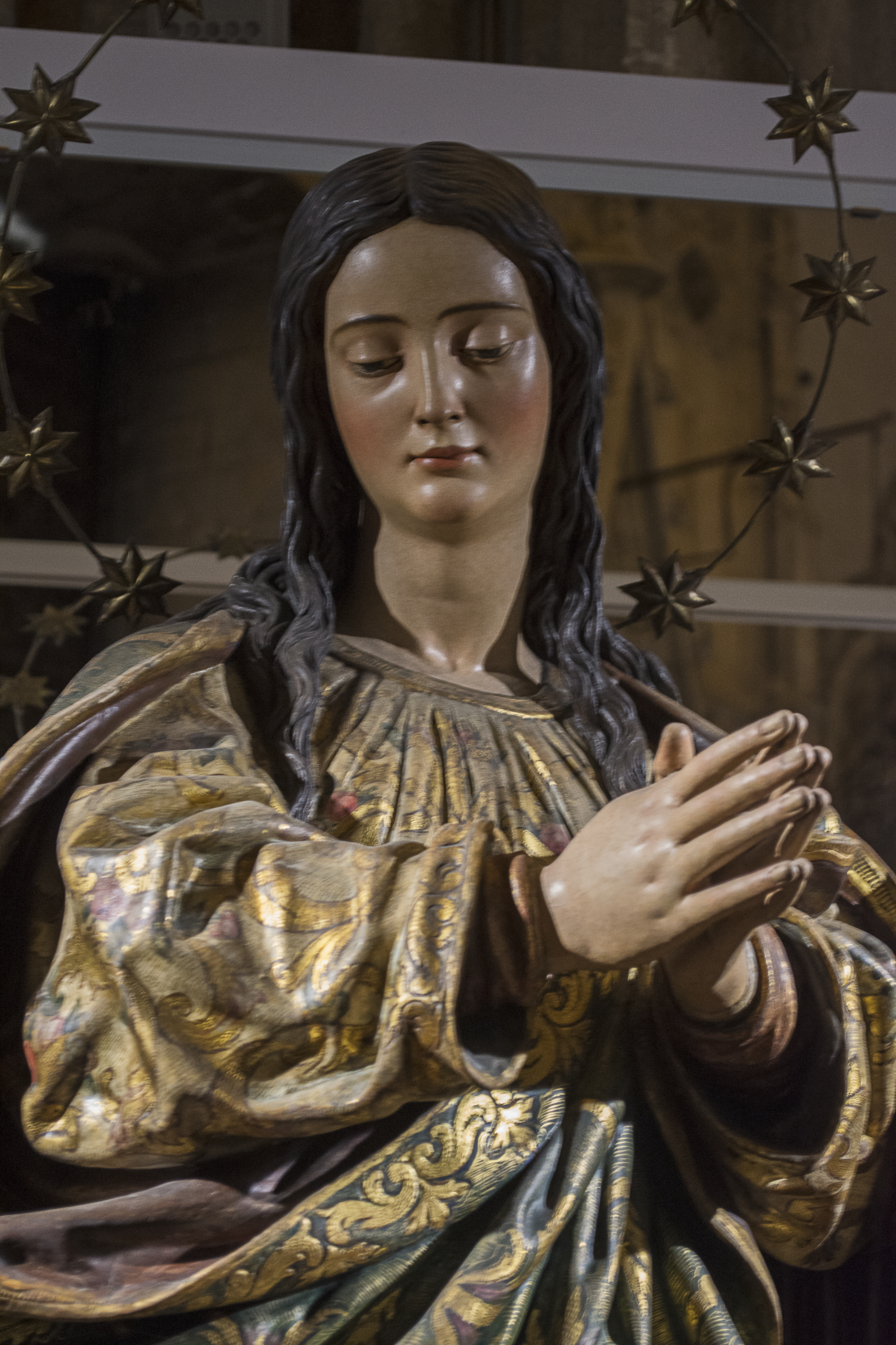 Detalle Inmaculada, (La Cieguecita) (1629-1631), autor: Juan Martínez Montañés, Catedral de Sevilla.